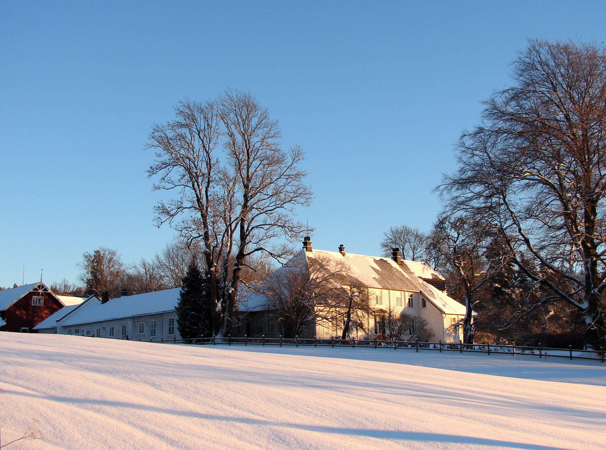 Borgestad Gård, Borgestad, Skien, Norge